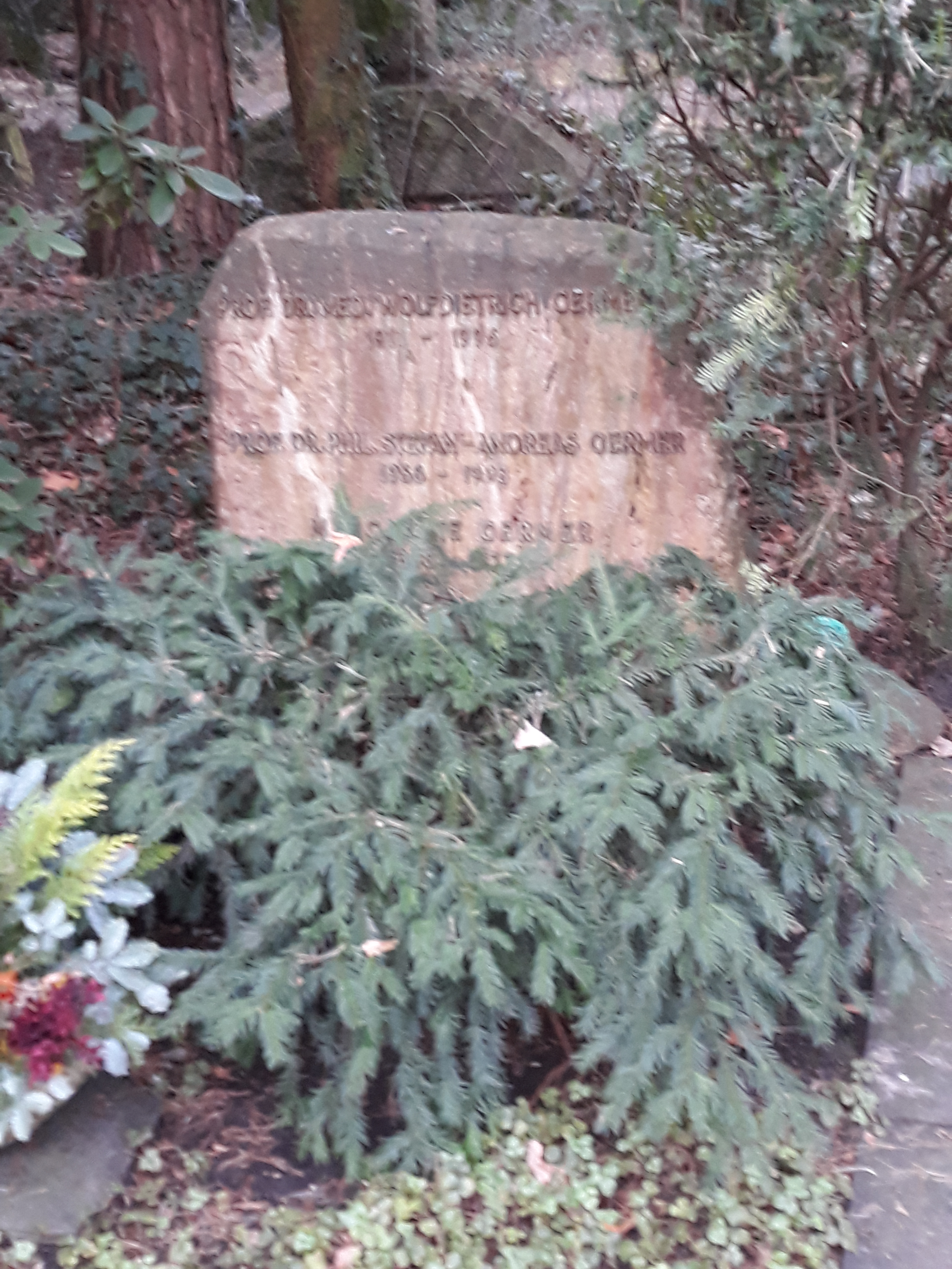 Das Grab des deutschen Kunsthistorikers Stefan Germer im Familiengrab auf dem Parkfriedhof Lichterfelde in Berlin.